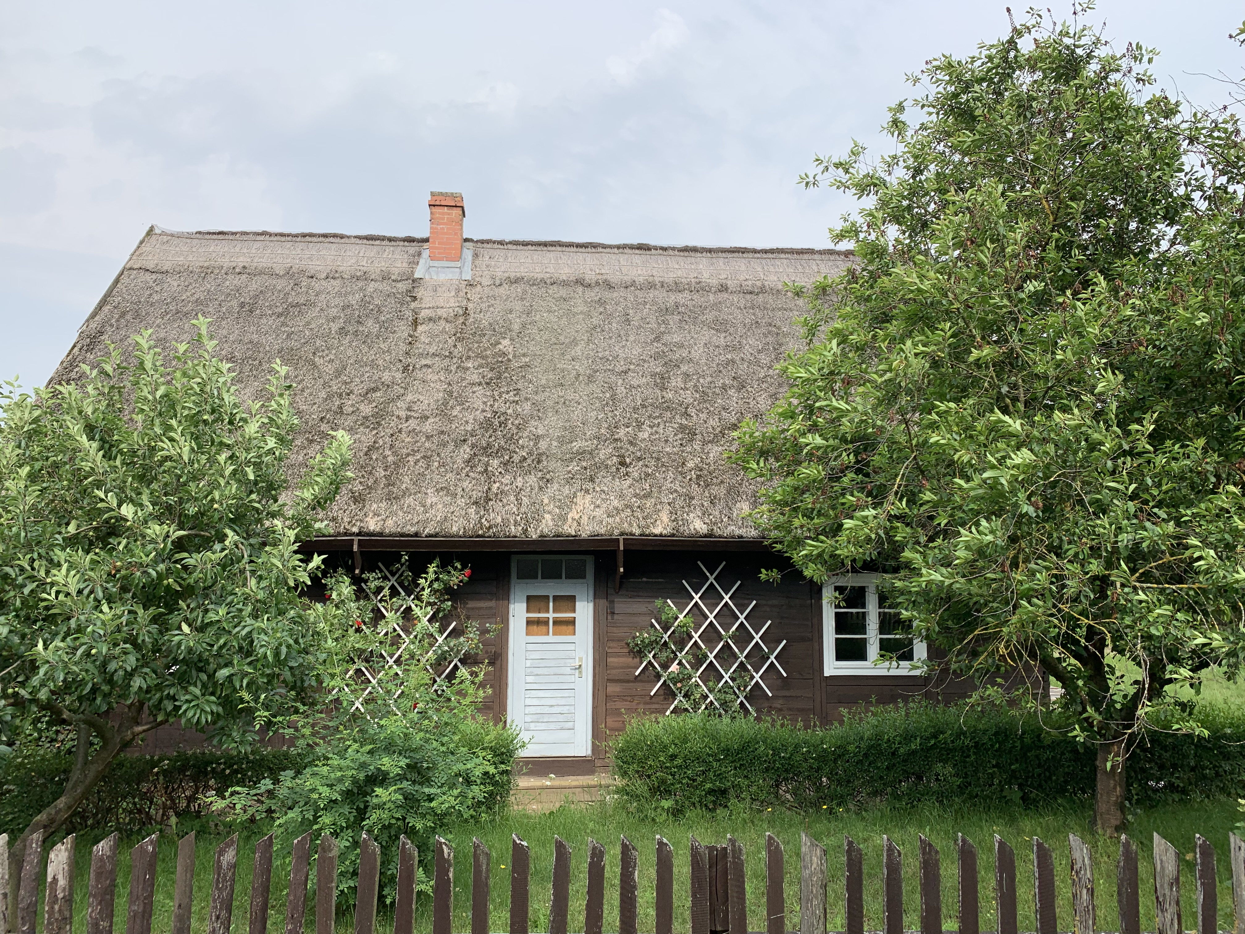 Das Gebäude in der Hofstraße 5 in Linstow-Dobbertin ist ein denkmalgeschütztes Wohnhaus im Landkreis Rostock in Mecklenburg-Vorpommern.